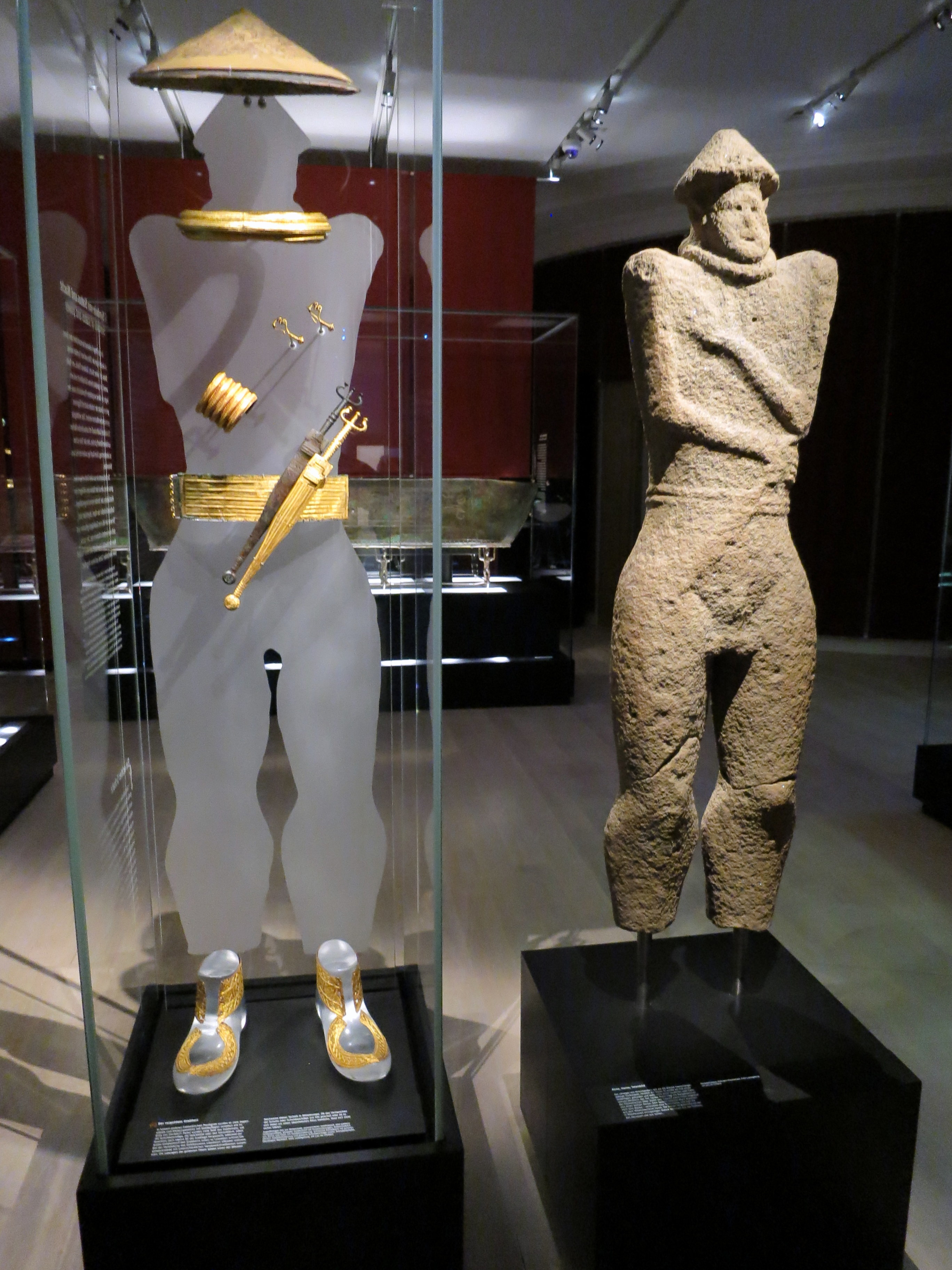 Die Figur trägt die typischen Rangabzeichen der frühkeltischen Elite, was durch die Figur daneben illustriert wird. Es ist die älteste menschengestaltliche Großplastik Mitteleuropas